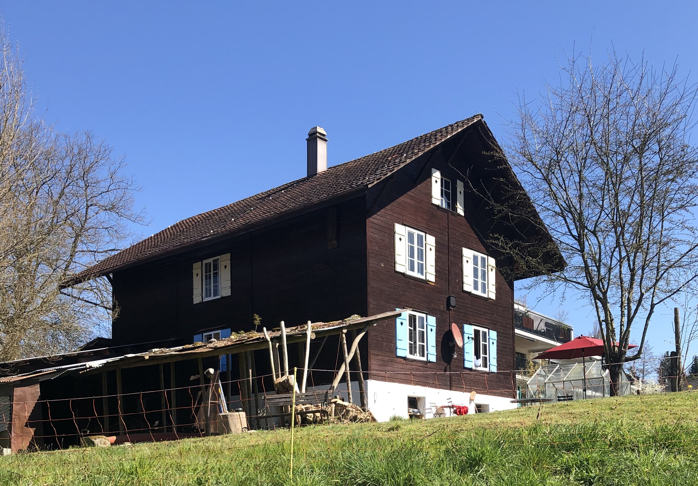 Eymatt Wohnhaus